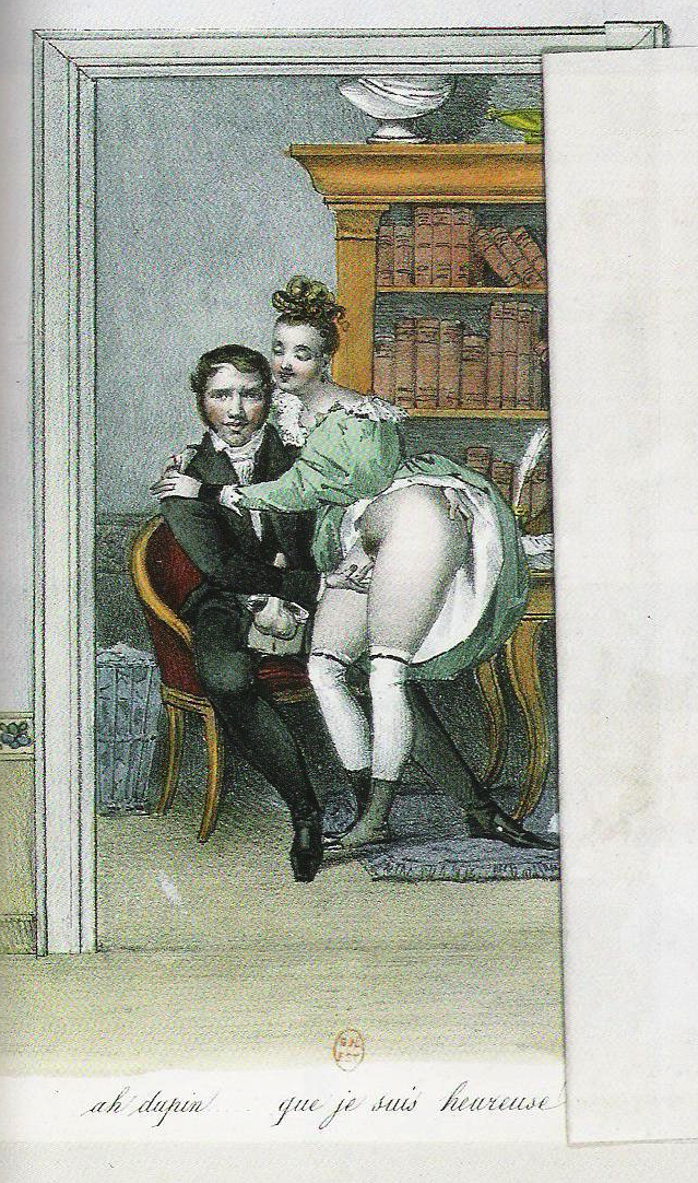 Tafel N°6 aus: Portes et fenêtres (nouvelle série), collection des 36 dessins coloriés. Paris 1835.